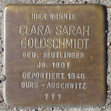 Deutschland (D) - Baden-Württemberg (BW) - Landkreis Esslingen (ES) - Kirchheim unter Teck: Stolperstein für 'Clara Sarah Goldschmidt'